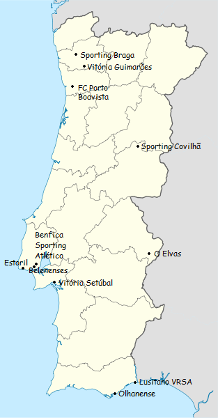 Carta dos clubes participantes do campeonato de portugal de futebol de primeira divisao 1948-1949